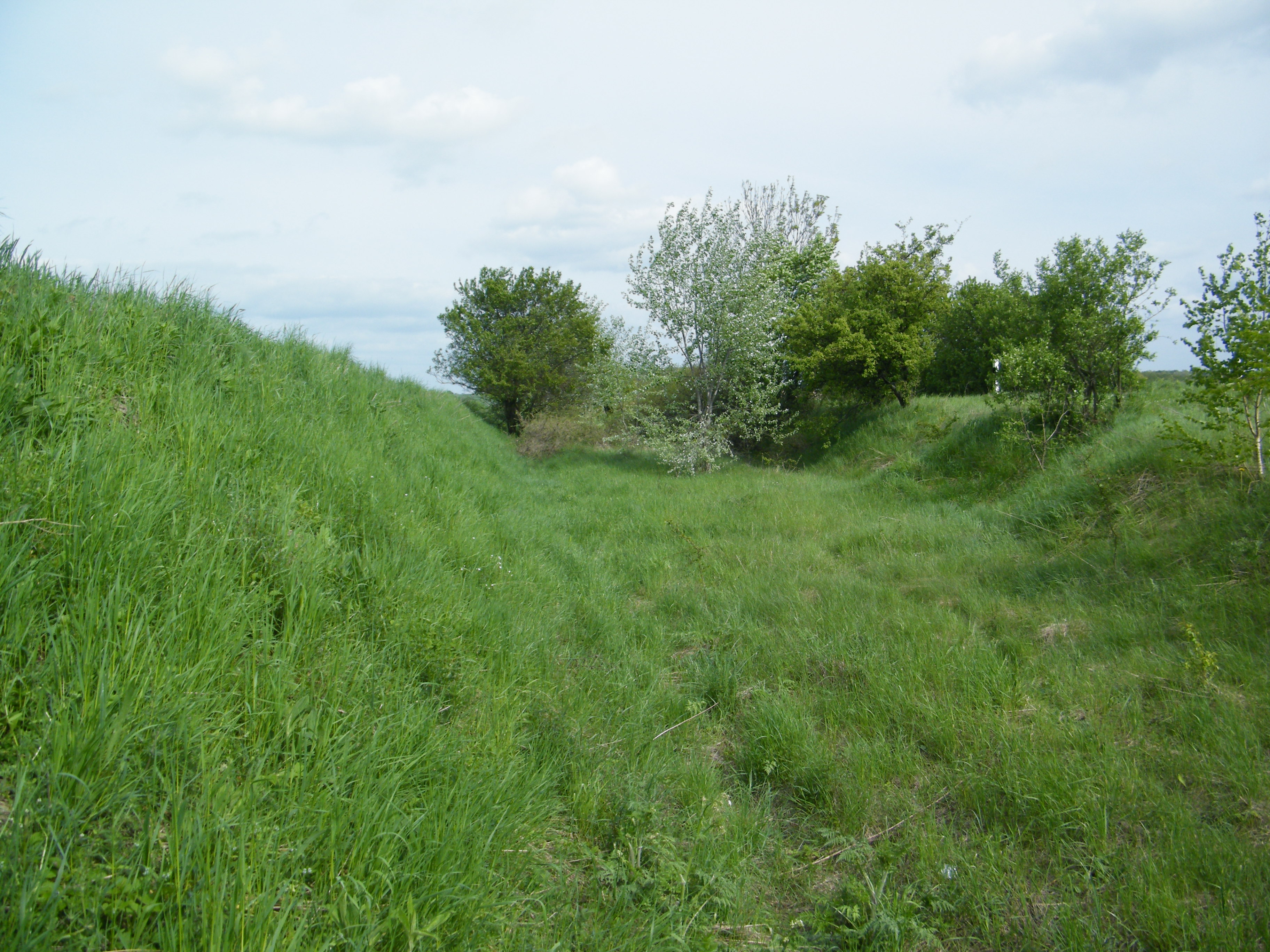 Einschnitt der Strecke Dedelow-Fürstenwerder der Prenzlauer Kreisbahnen Unknown